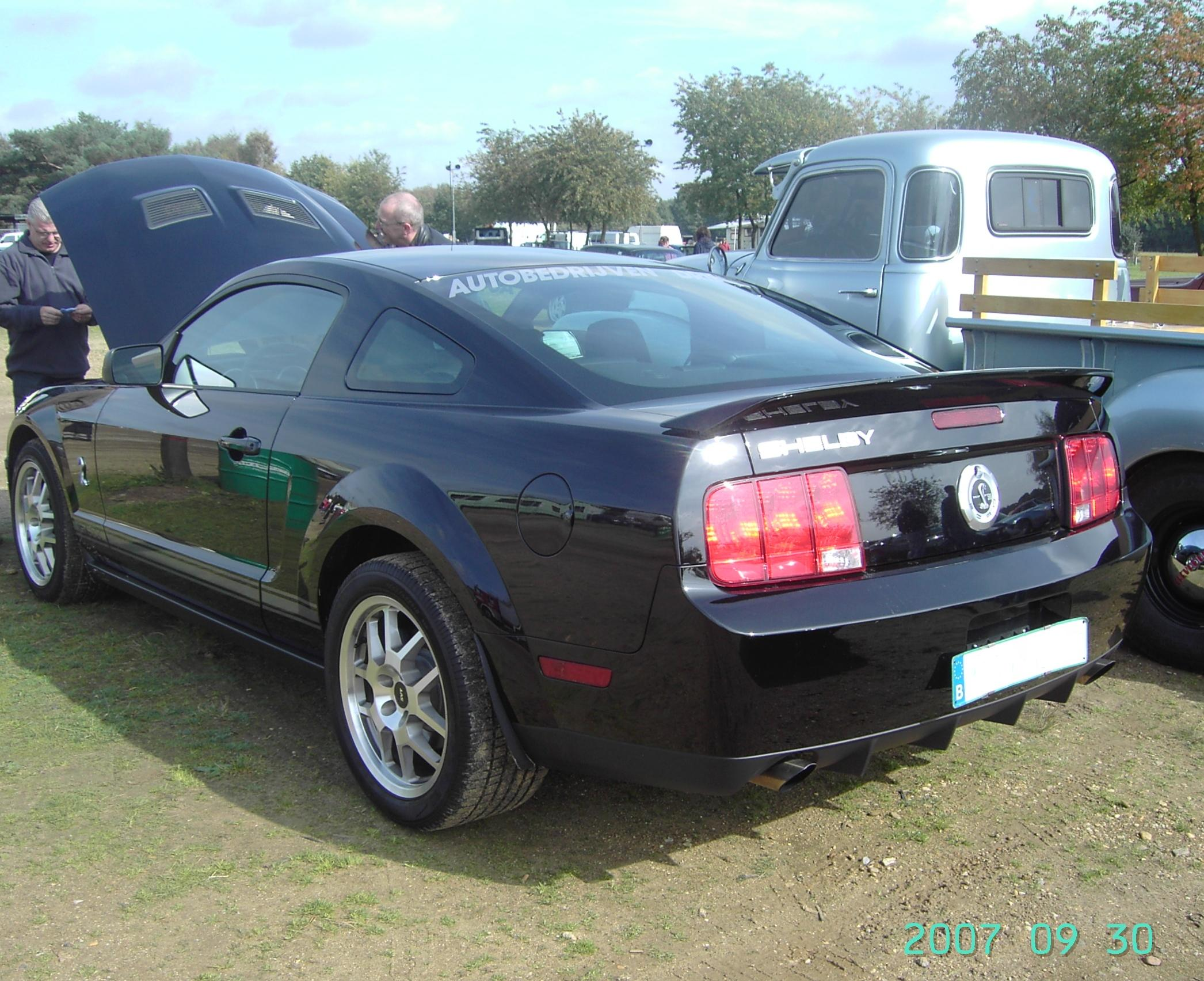 I took this photograph on 09 september on the "Special Car Treffen" at the "Duivelsbergcircuit" in Belgium.